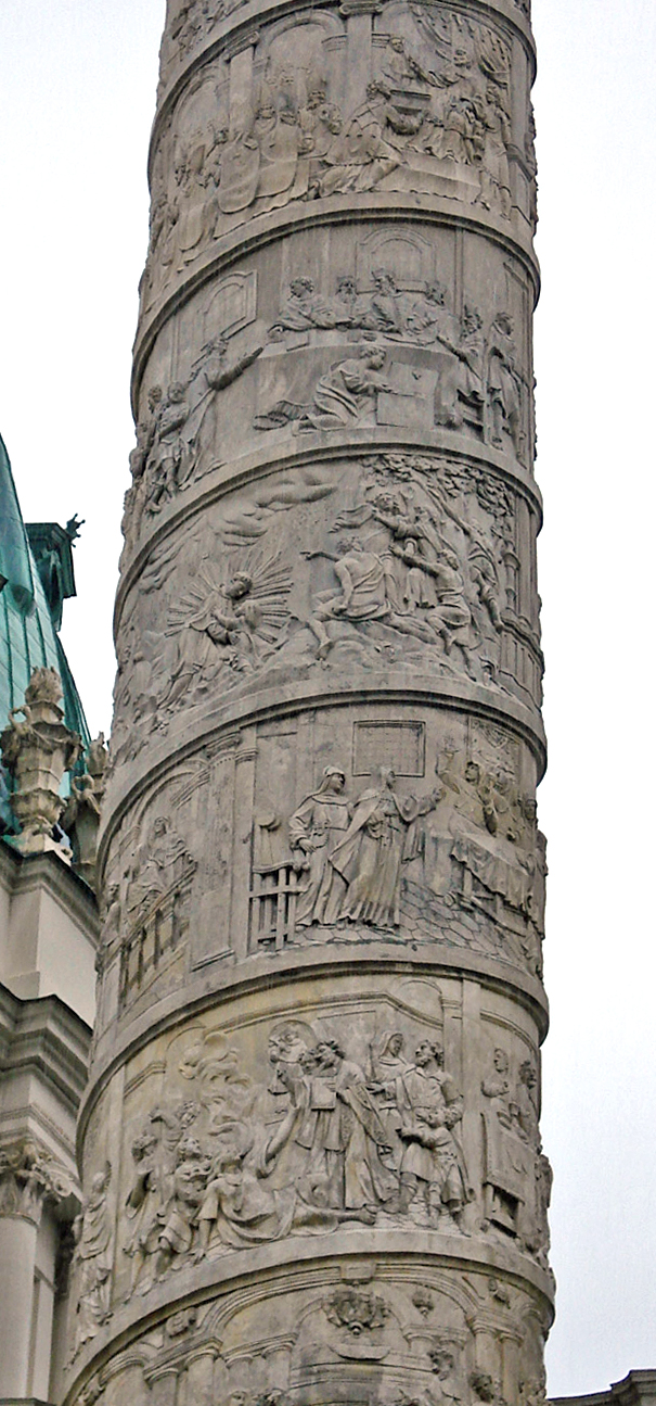 Dëst Bild weist am Detail e puer Szenen aus dem Liewen vum Carlo Borromeo op der rietser Reliefsail vun der Wiener Karelskierch